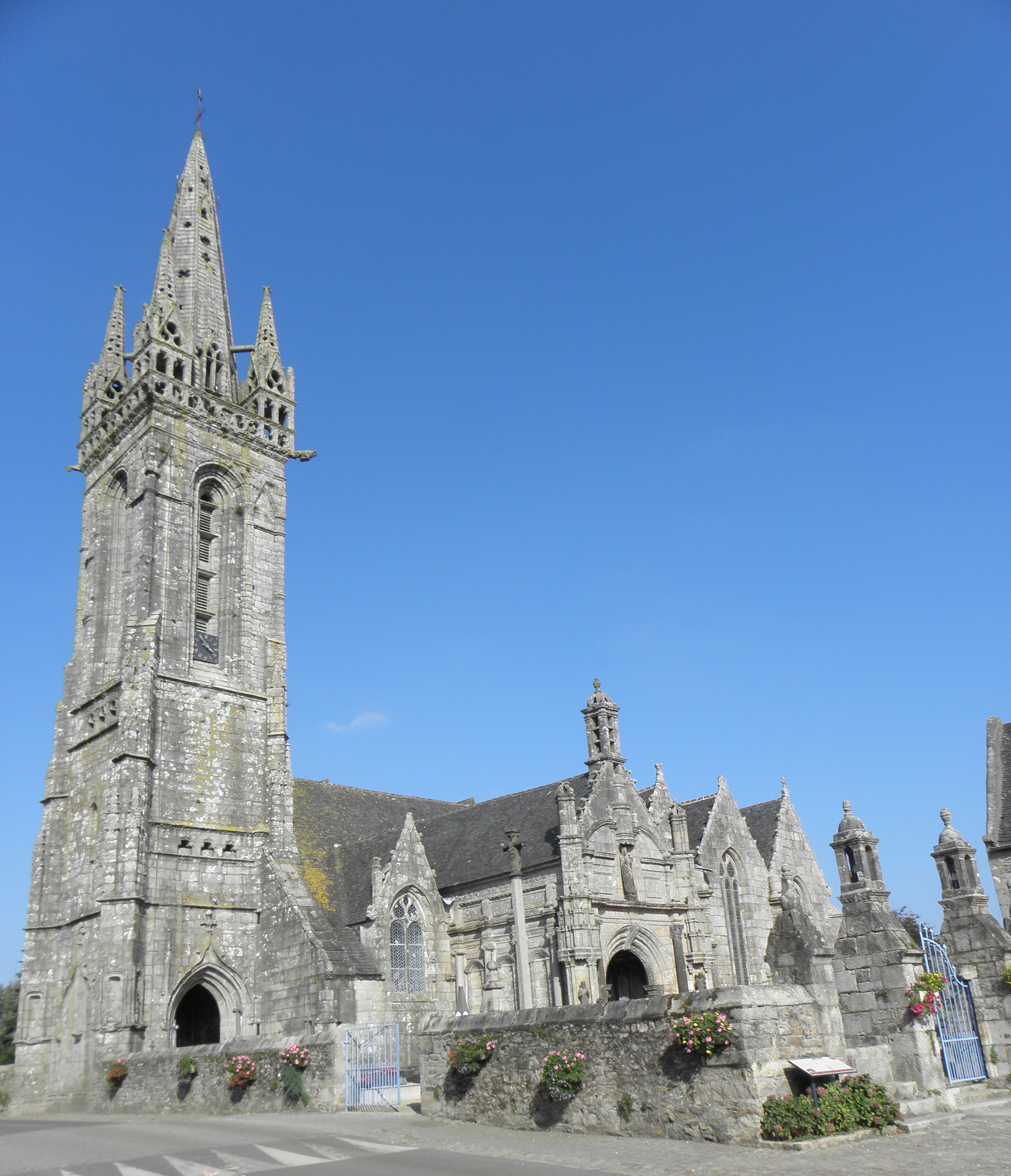 Vue méridionale de l'église Notre-Dame de Bodilis (29). .